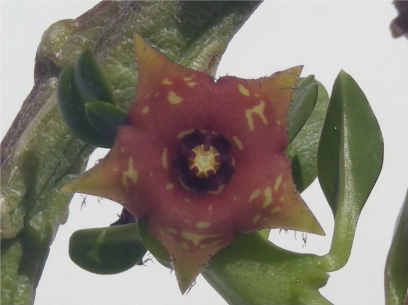 Caralluma frerei = Frerea indica